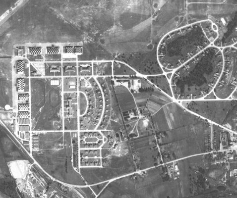 Maxwell Field, Alabama